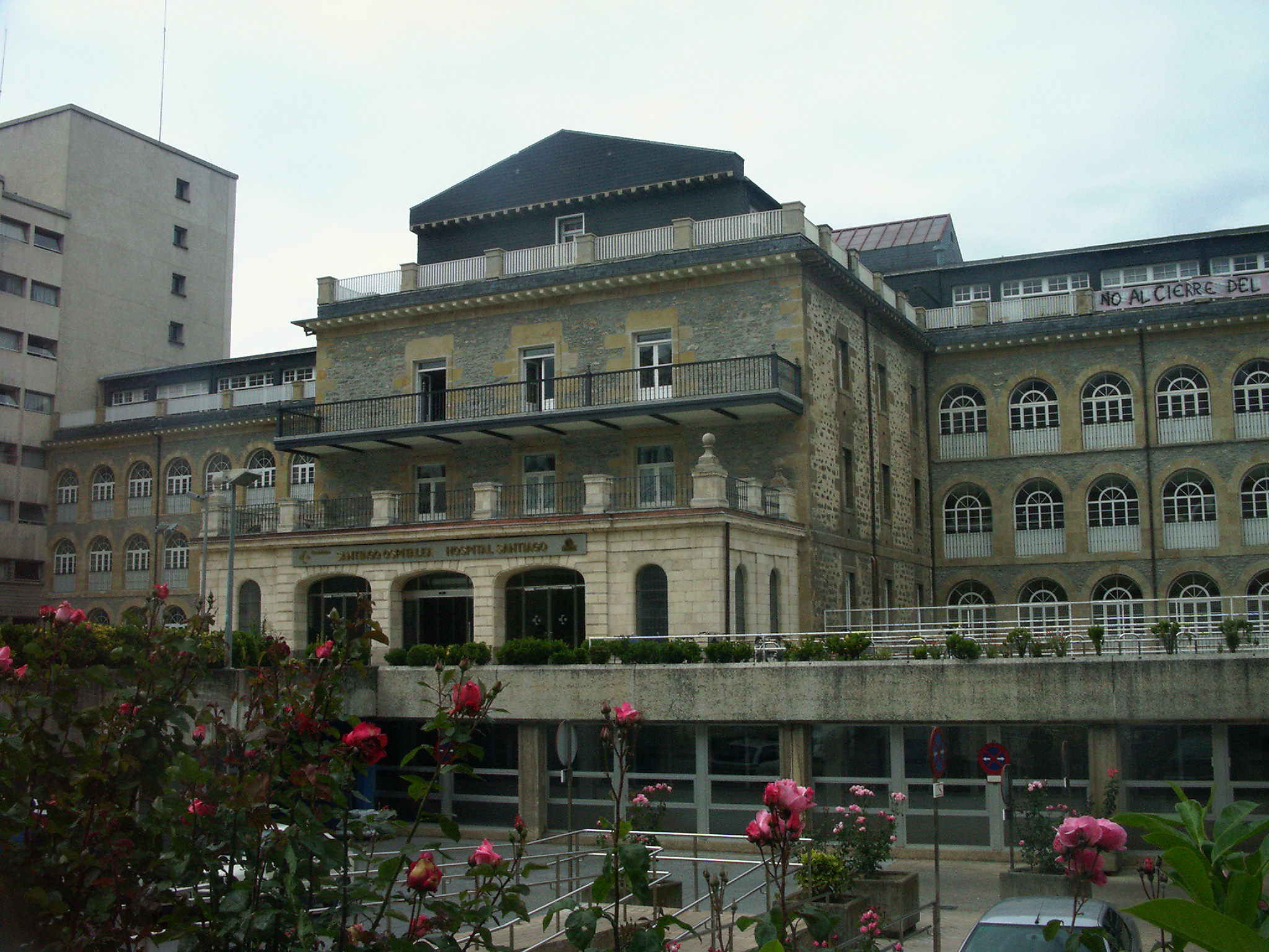 Santiagoko Ospitalea, Vitoria-Gasteiz (Araba, Espainia).